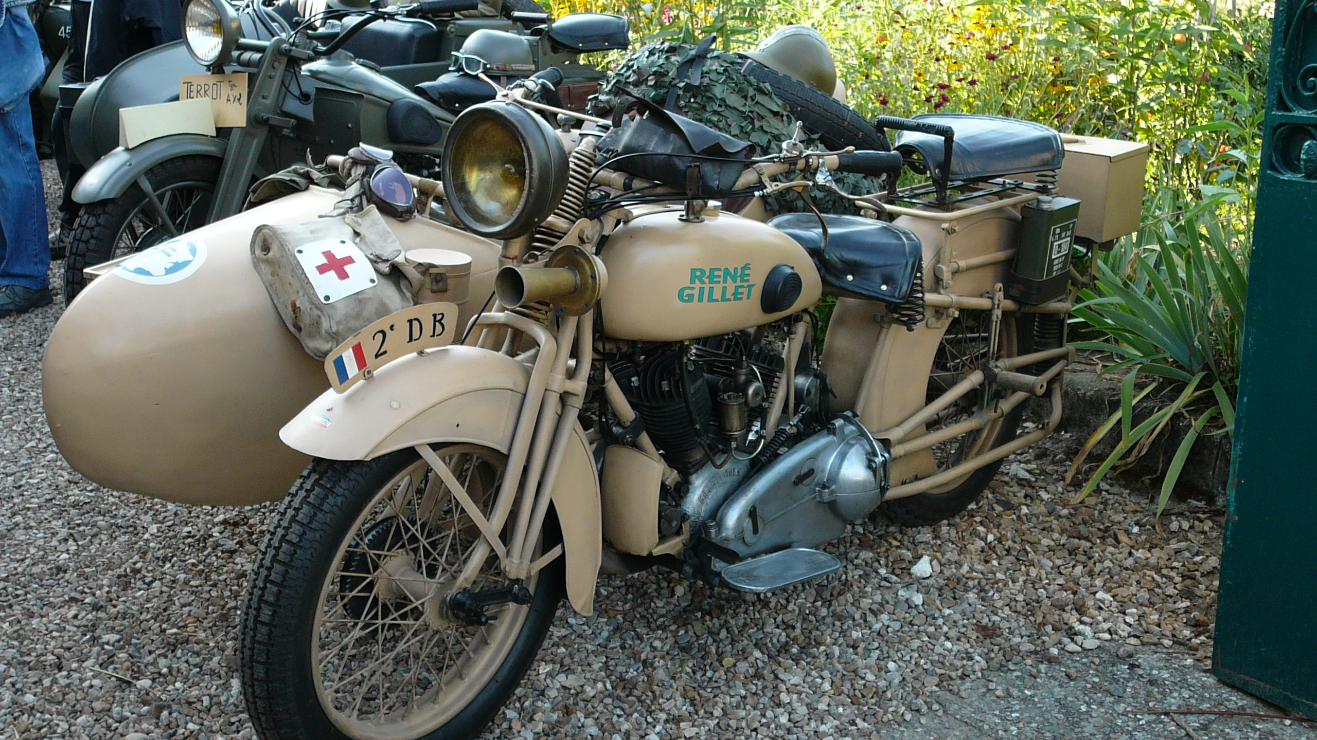 Moto René Gillet non identifiée photographiée sur le Tour de France 2008 des motos anciennes